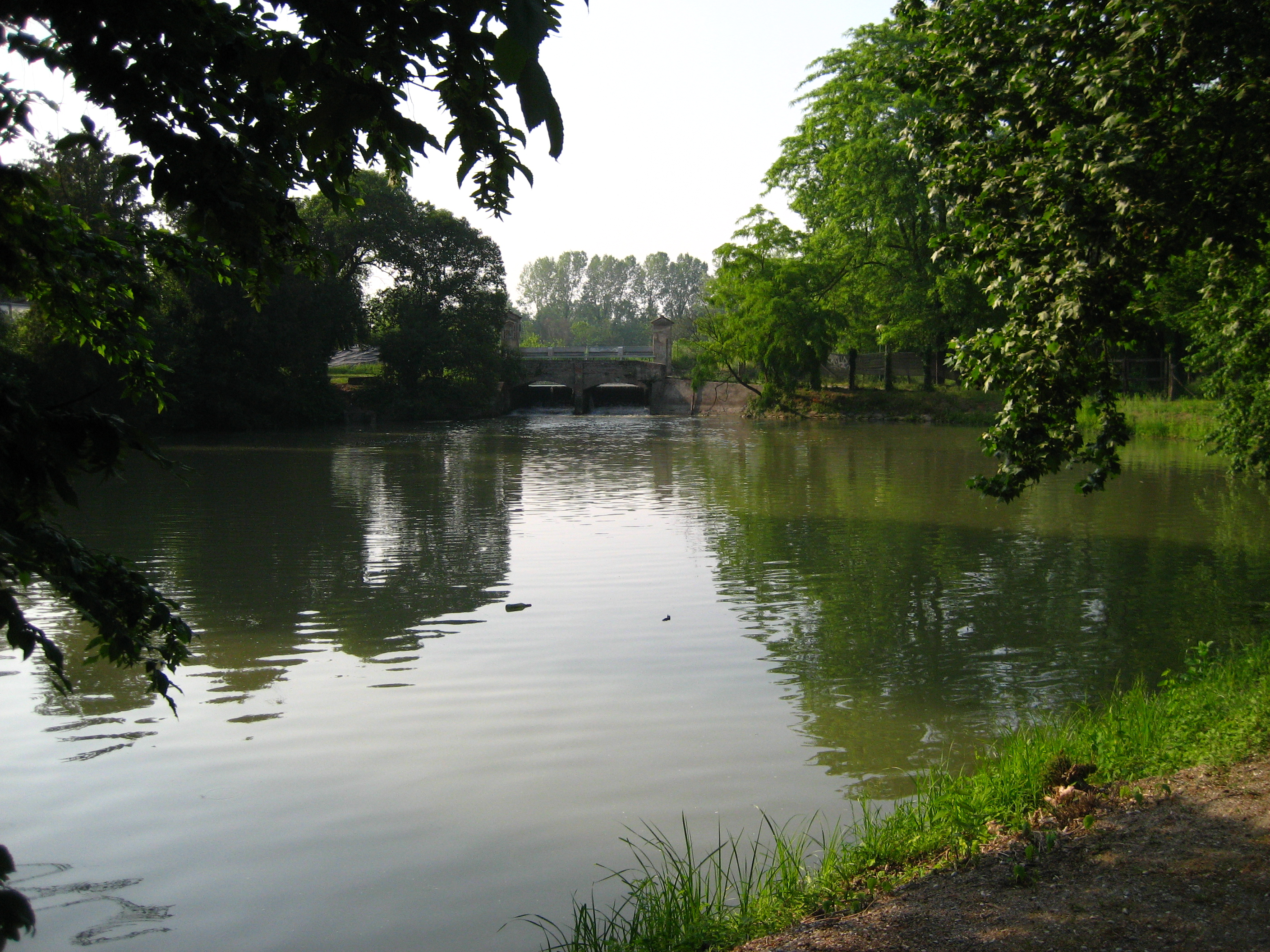 Il fiume Muson Vecchio allo sbarramento del 1604 del "Bacino di sopra" a Mirano